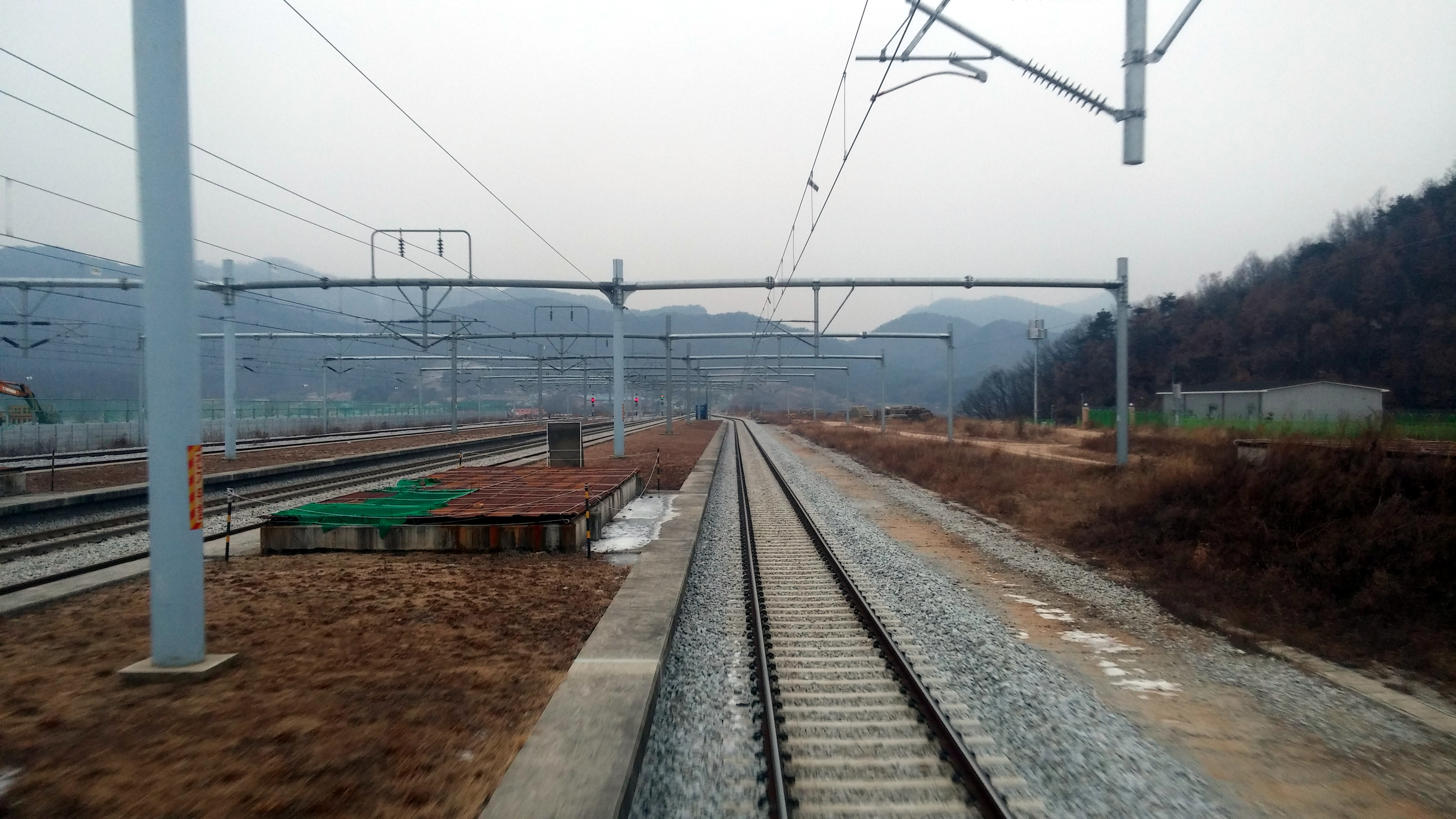 한국철도공사 서원주역 승강장(미사용).